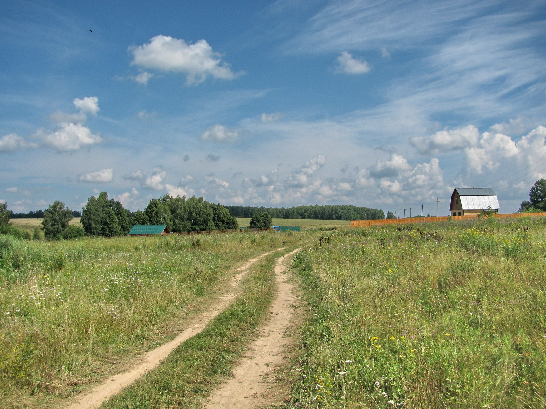 Тула. Дорога Наспищи - Заокский. 20/07/2011г.